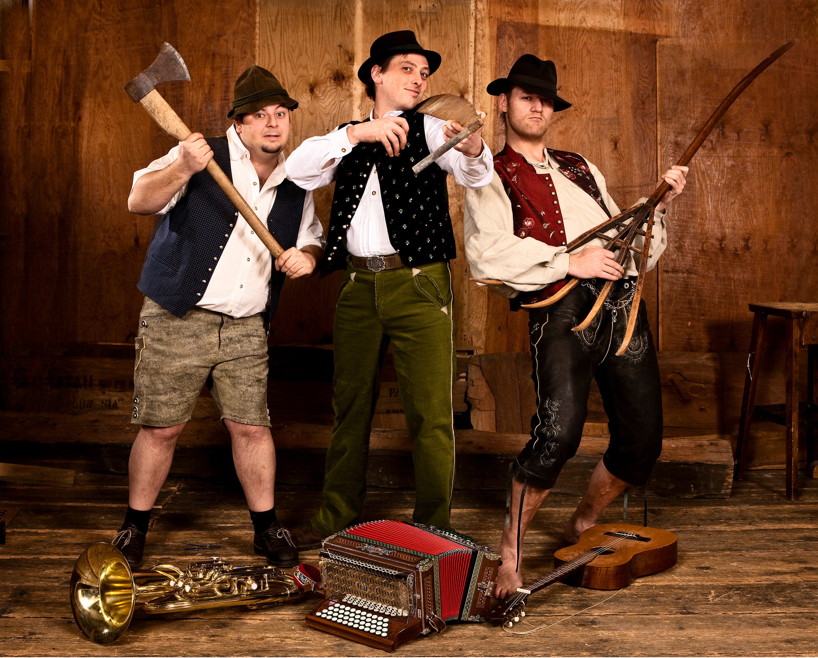 Foto: Hubert Lankes